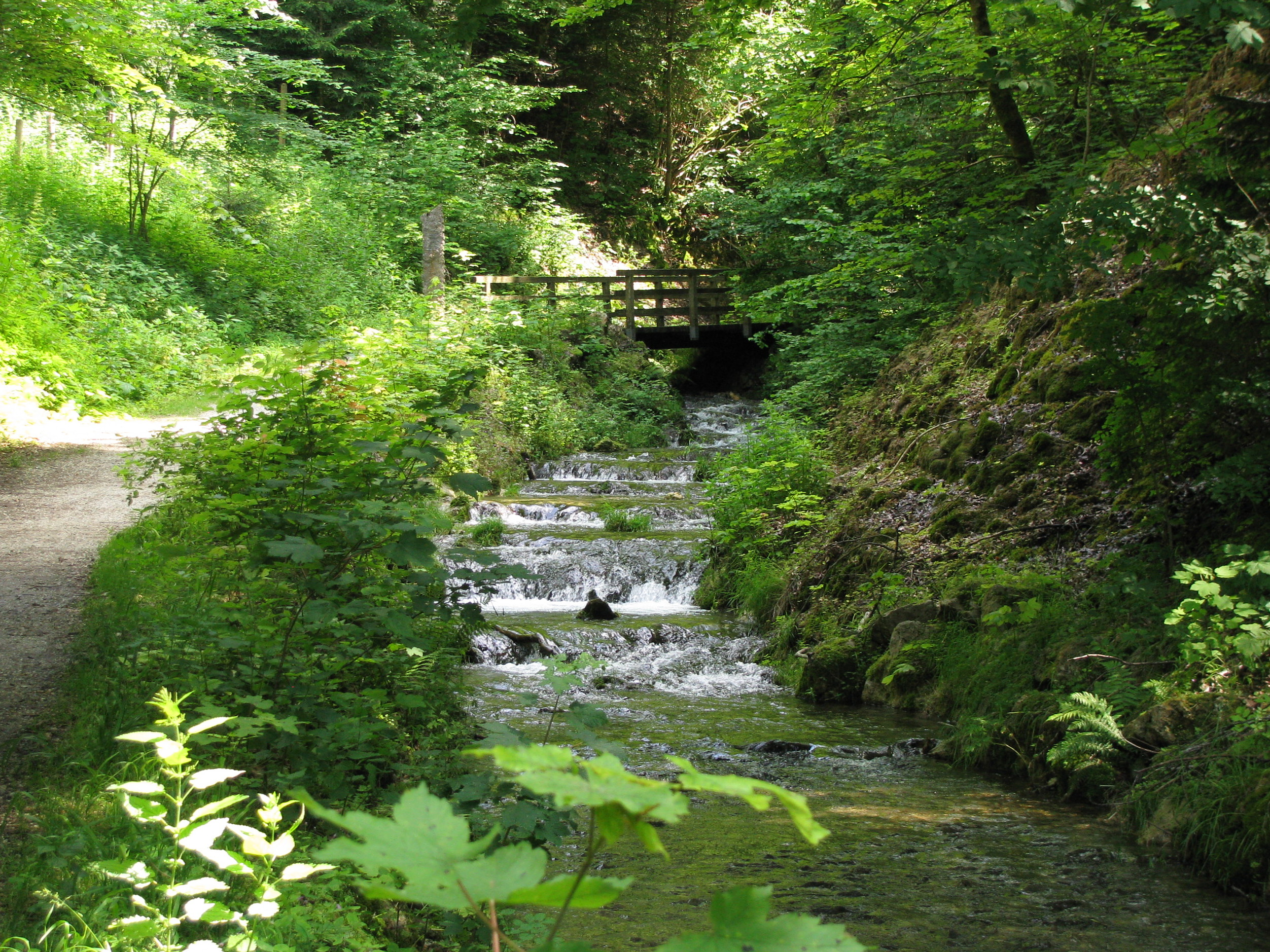 Dorfängerbach im Bereich der Teufelsküche, kurz vor seiner Mündung in den Lechsee.